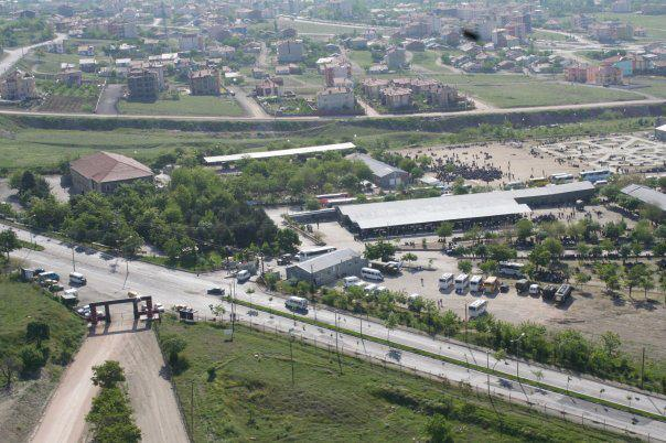 Van'ın Özalp ilçesinden bir görünüm. Ortadaki karayolu Kapıköy Sınır Kapısı'na gitmektedir.